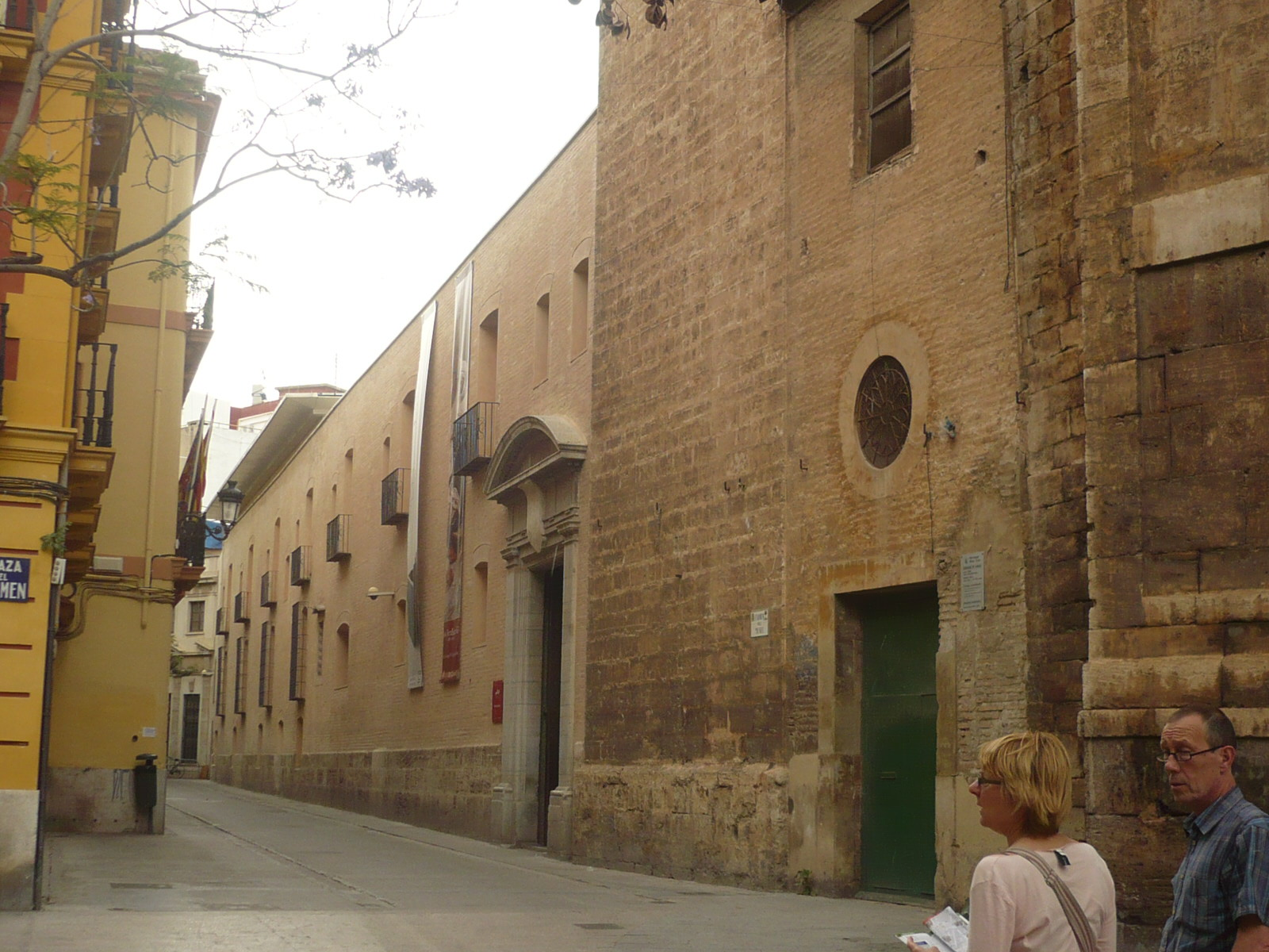 Convento e Iglesia del carmen vistos desde la Plaza del carmen de Valencia.